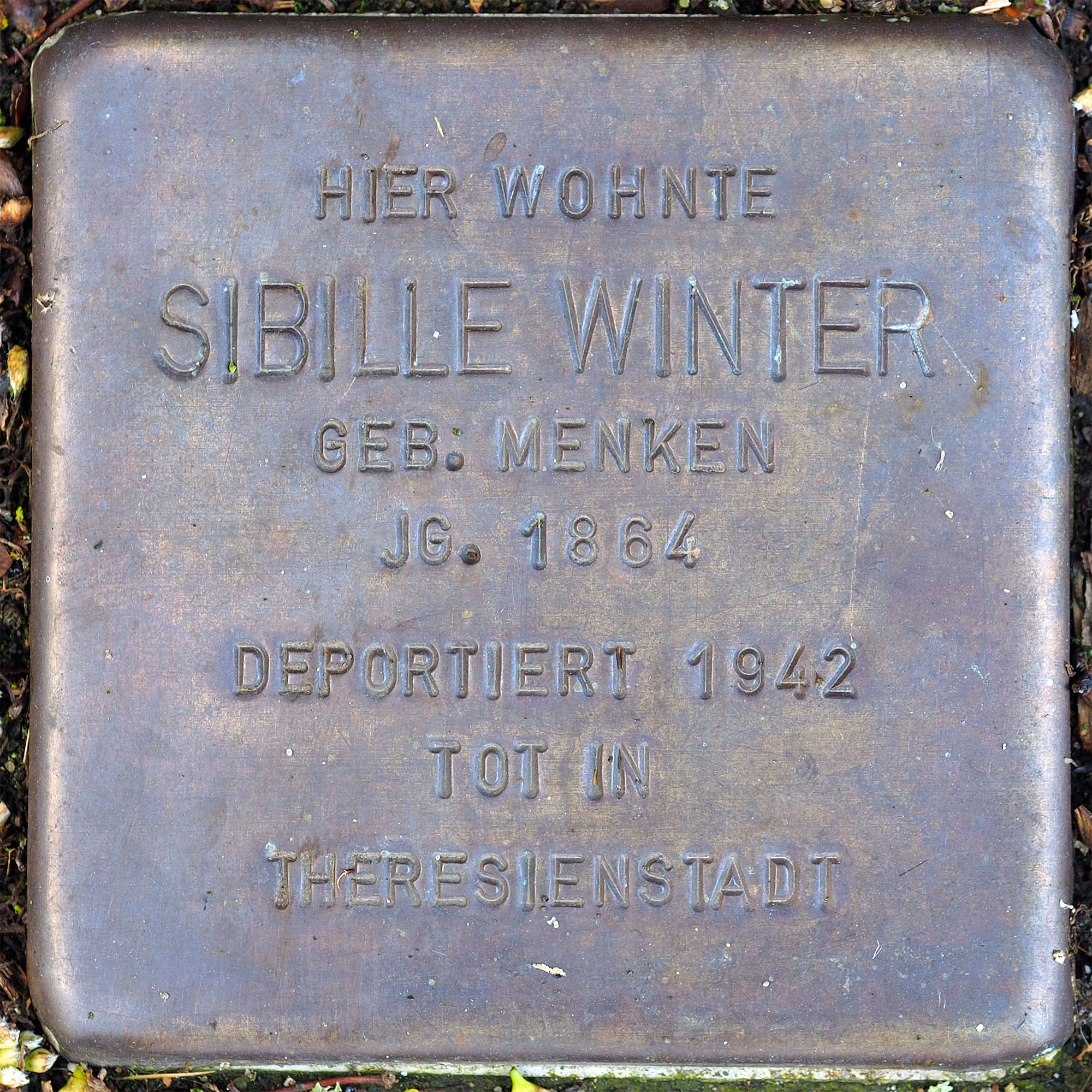 Stolpersteine MG: Winter, Sibille